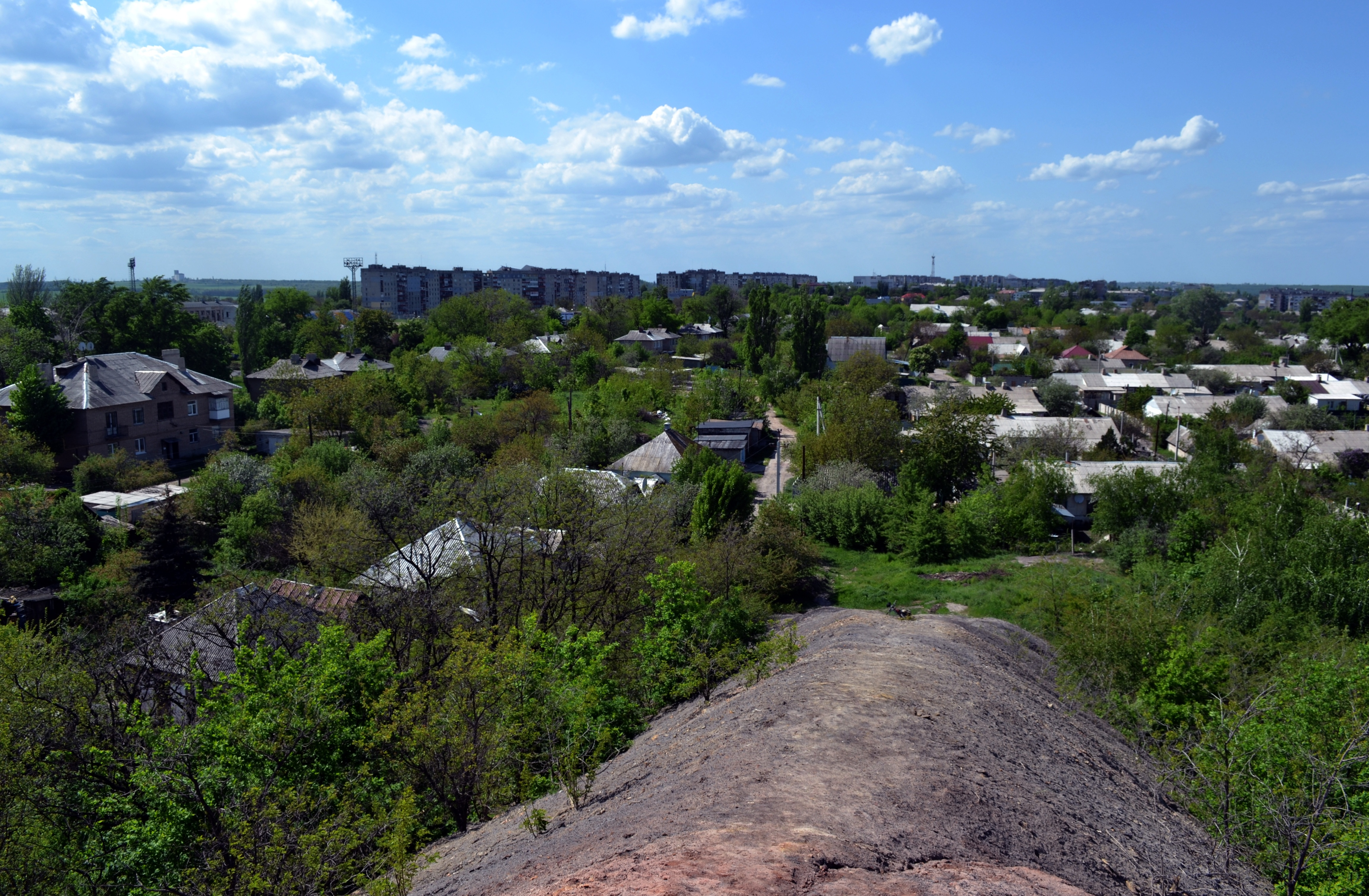 на териконі шахти Оріон м.Лисичанськ